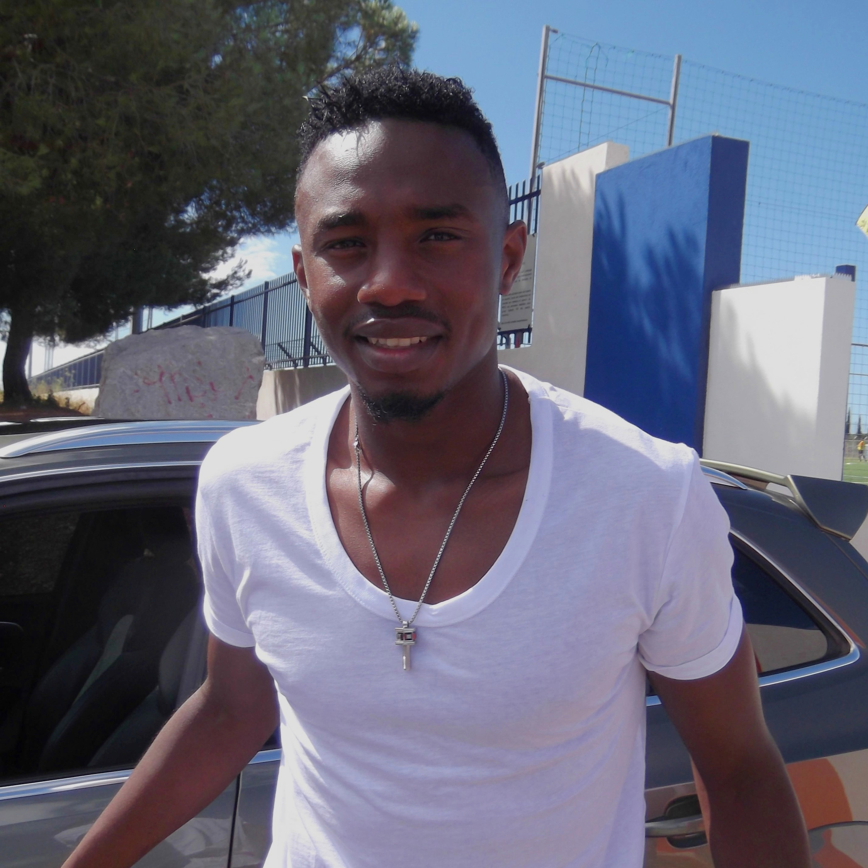 Bengali Fodé Koïta (MHSC), été 2013.